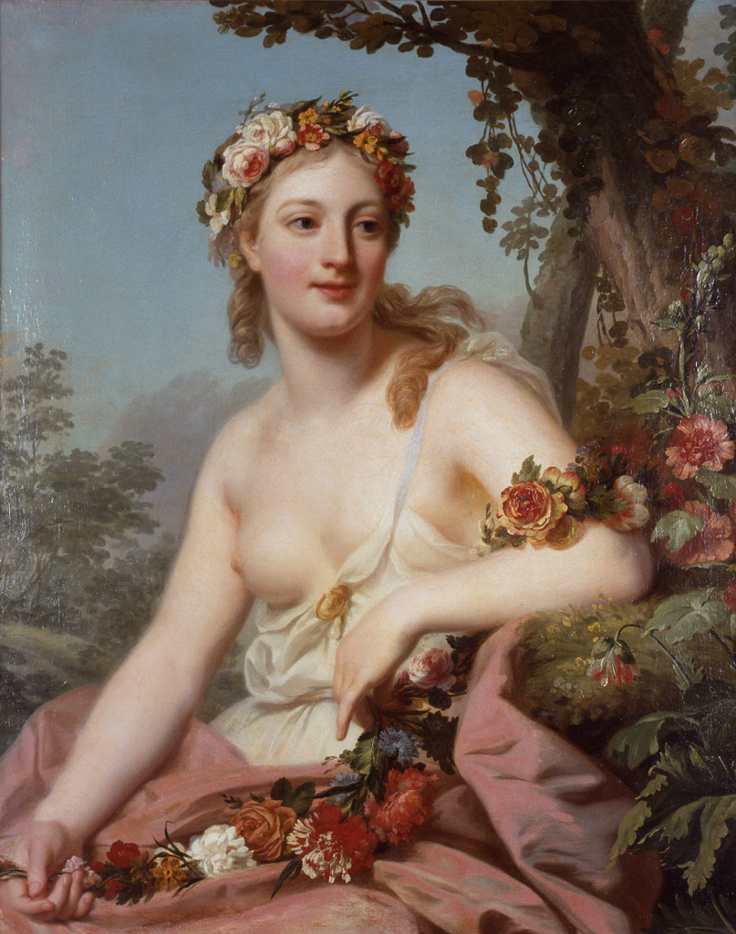 anciennement Hebe